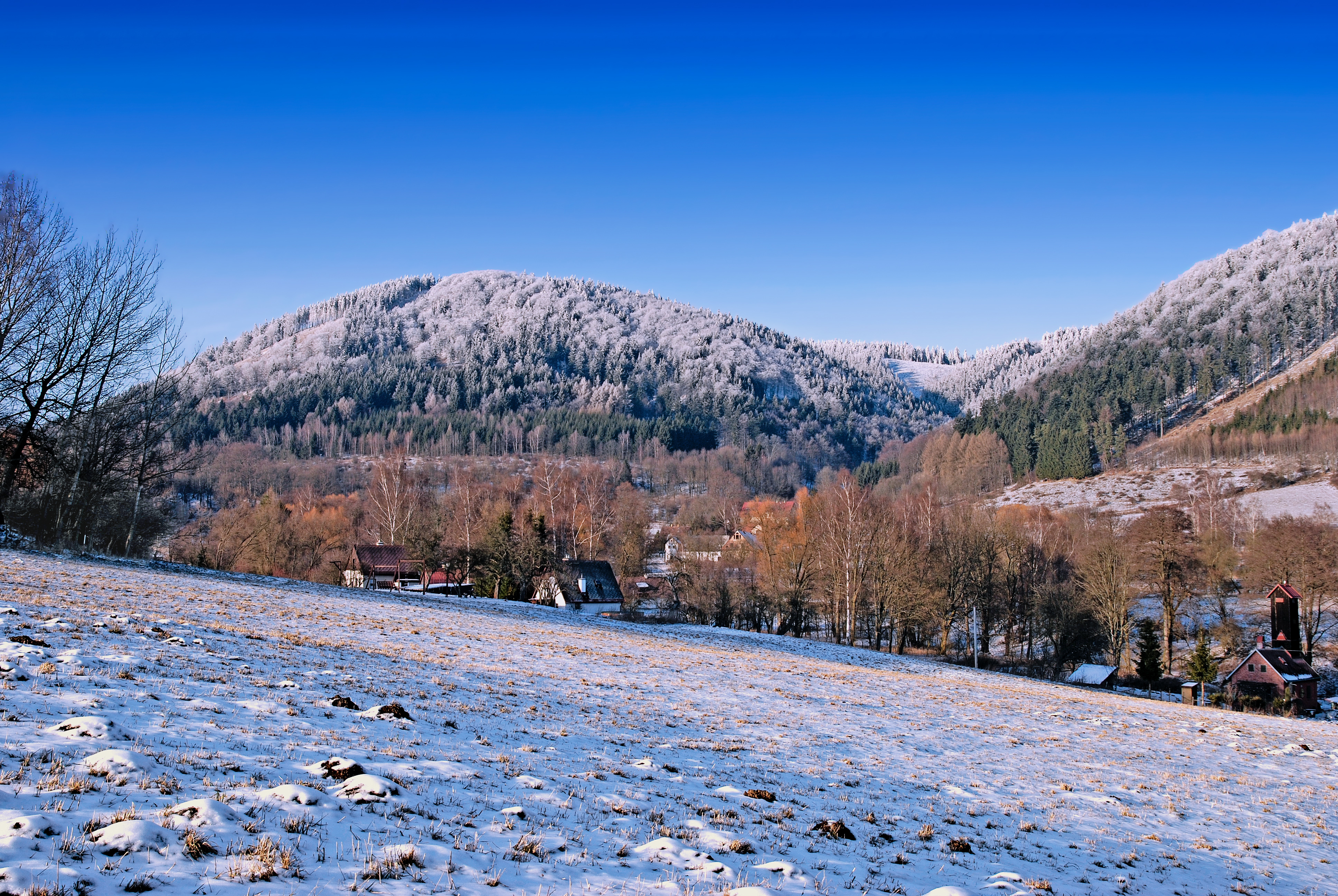 Bečkov